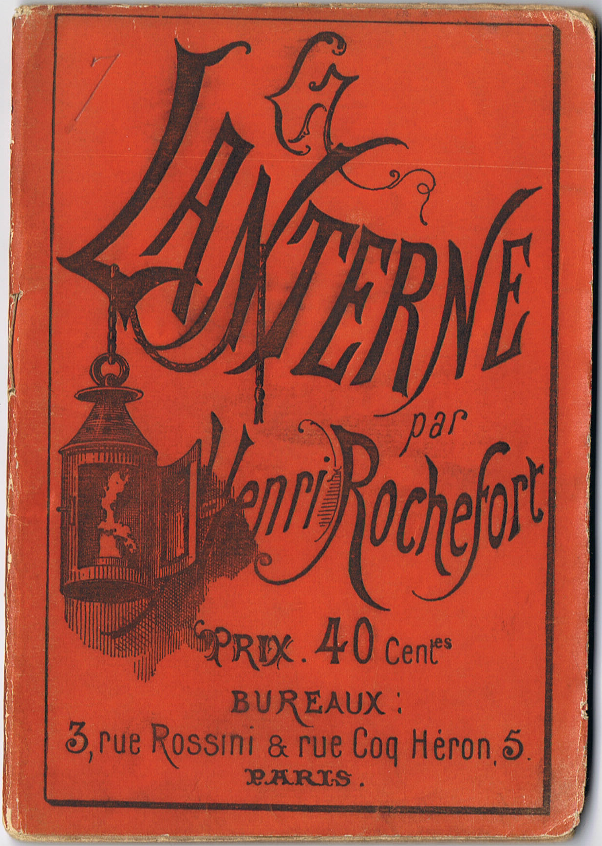 Couverture de La Lanterne, journal de Henri Rochefort. Numéro 7. Hauteur 14, 5 cm, largeur 10 cm